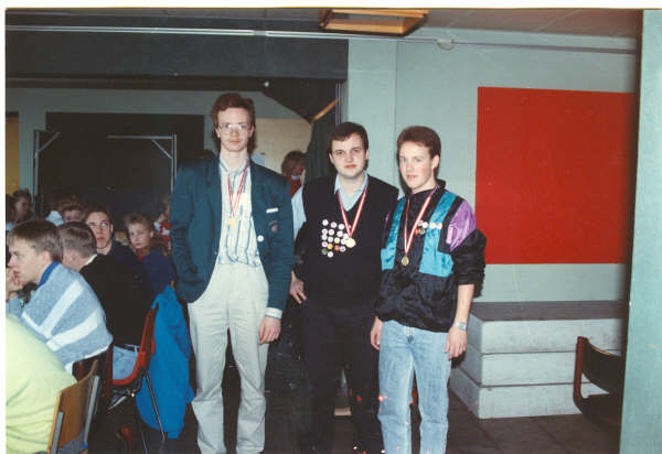 Kim Vagner Hansen (tv), Mårten Hede (midt) og Casper Hauberg Andreasen stillede op til fotografering under et af måltiderne ved FLOs generalforsamling i 1989 - afholdt i Århus. Siddende yderst t.v. med siden til Christian Yndigegn (fmd. 1990-91)